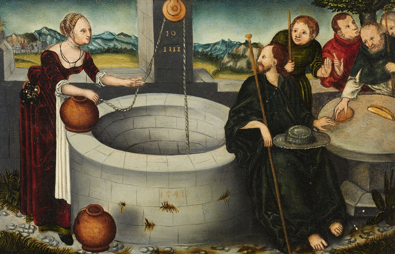 Nach einem Kupferstich von Hans Sebald Beham oder einem Gemälde von Franz Tymmermann (1541)